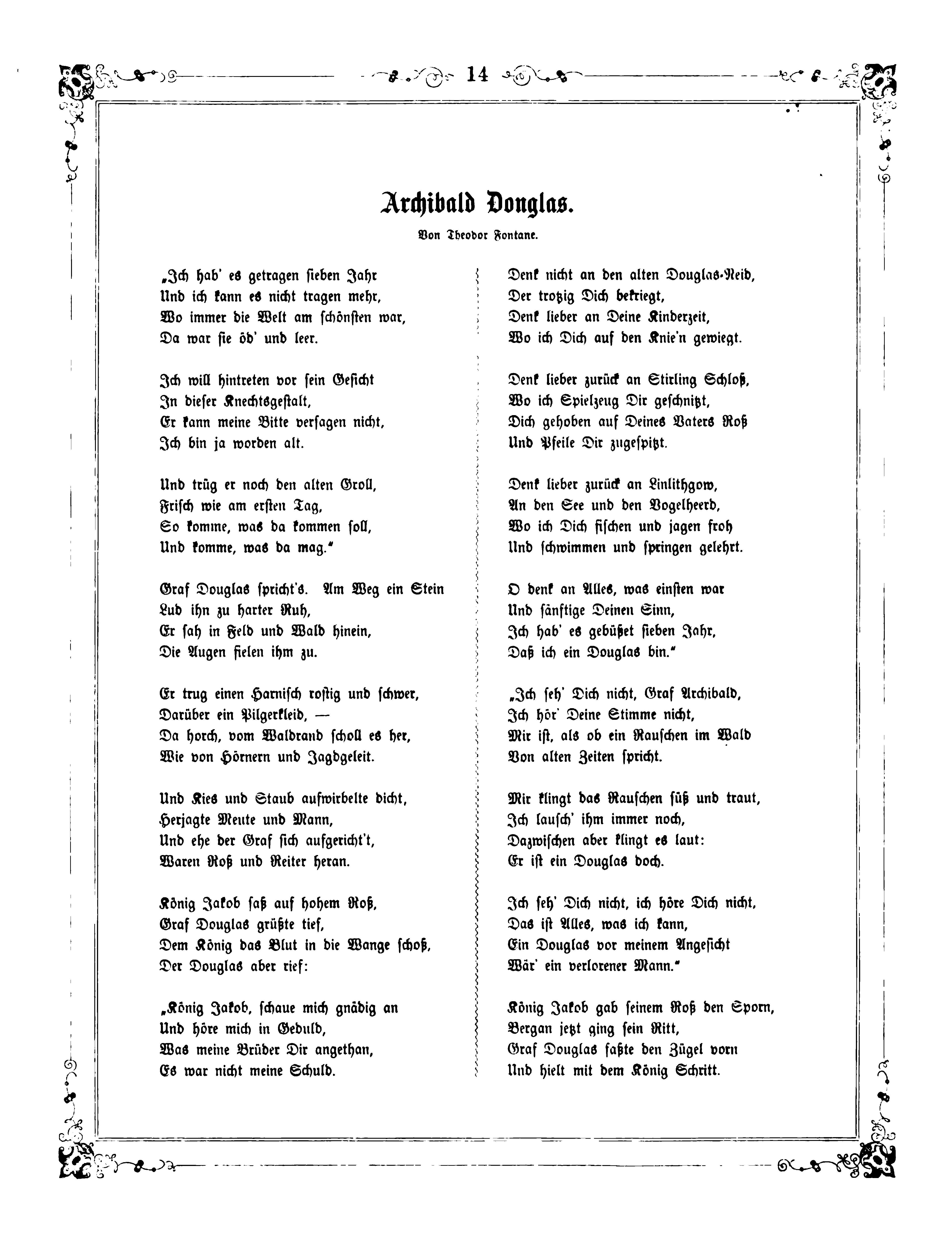 Archibald Douglas von Theodor Fontane. In: Argo. Album für Kunst und Dichtung, S. 14. Herausgeber: Friedrich Eggers, Theodor Hosemann, Franz Kugler (1808-1858). Verlag Trewendt & Granier, Breslau 1857